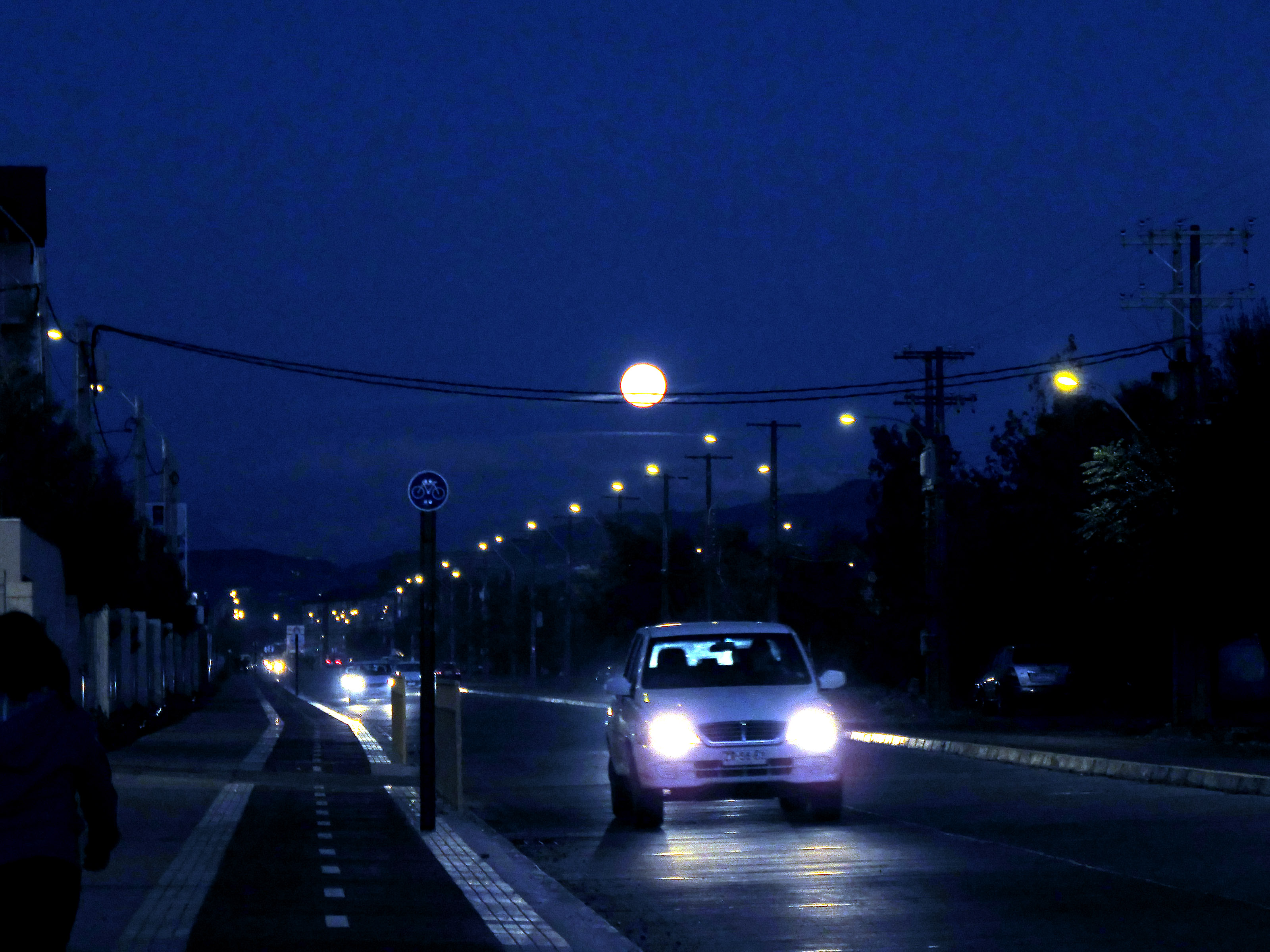 Curico, Circunvalacion